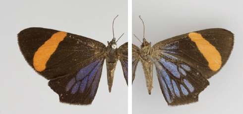 Hagnagora buckleyi